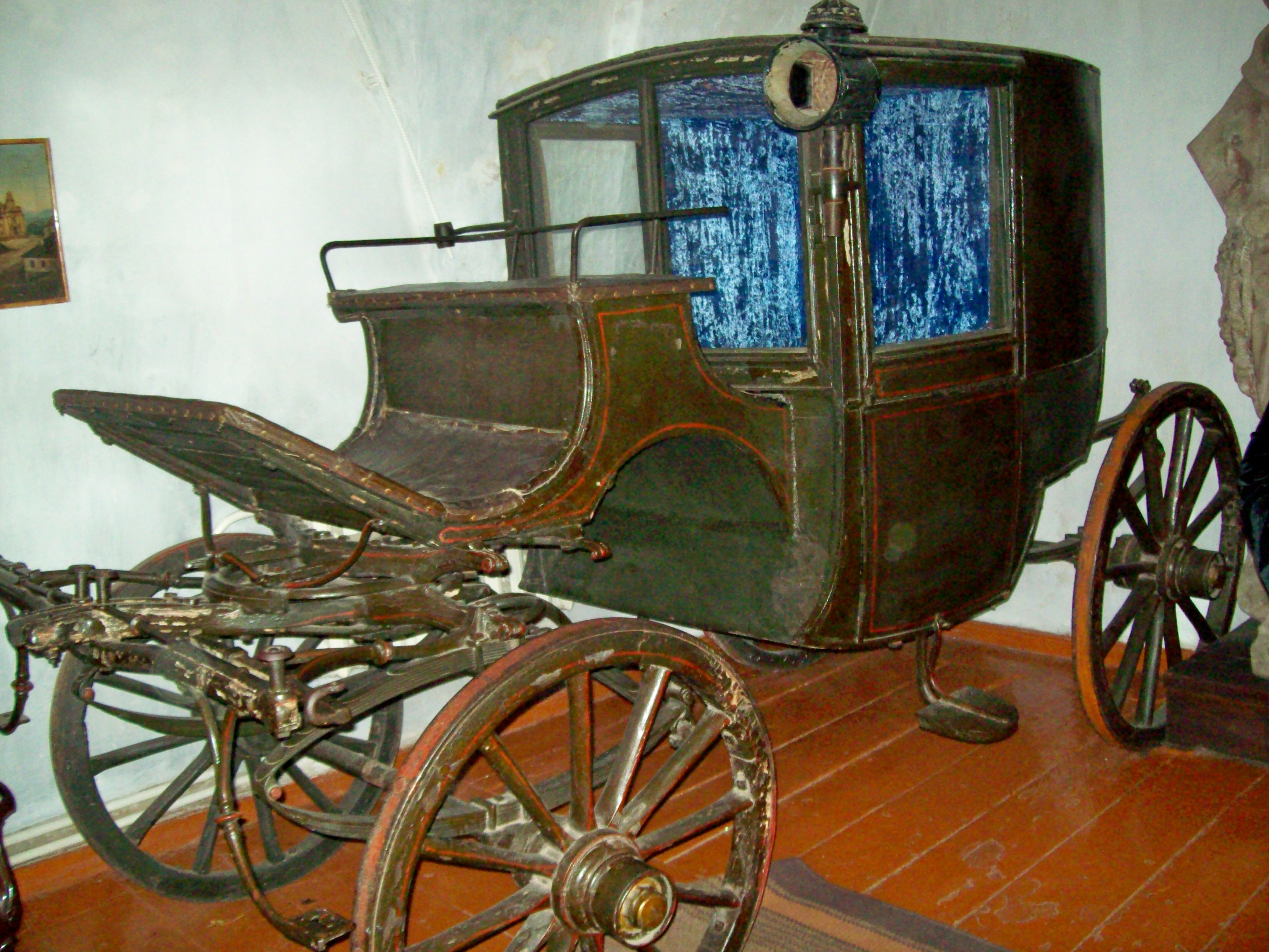 Знято фотоапаратом Кодак